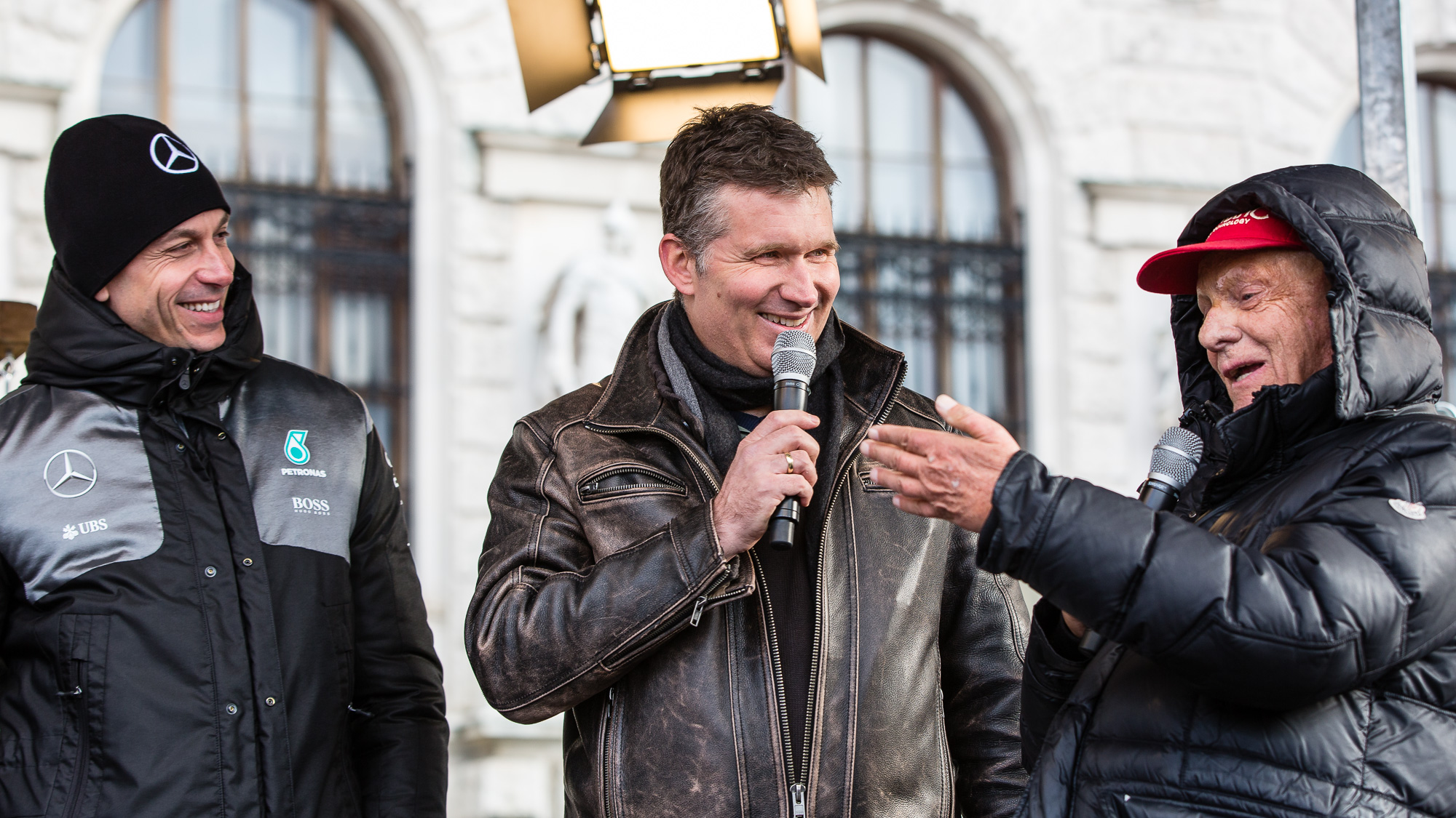 Niki Lauda und Toto Wolff bei der Publikumsveranstaltung "ÖAMTC Welt des Motorsports" Begleitend zu FIA Gala in der Wiener Hofburg am Freitag, 2. Dezember am Wiener Heldenplatz